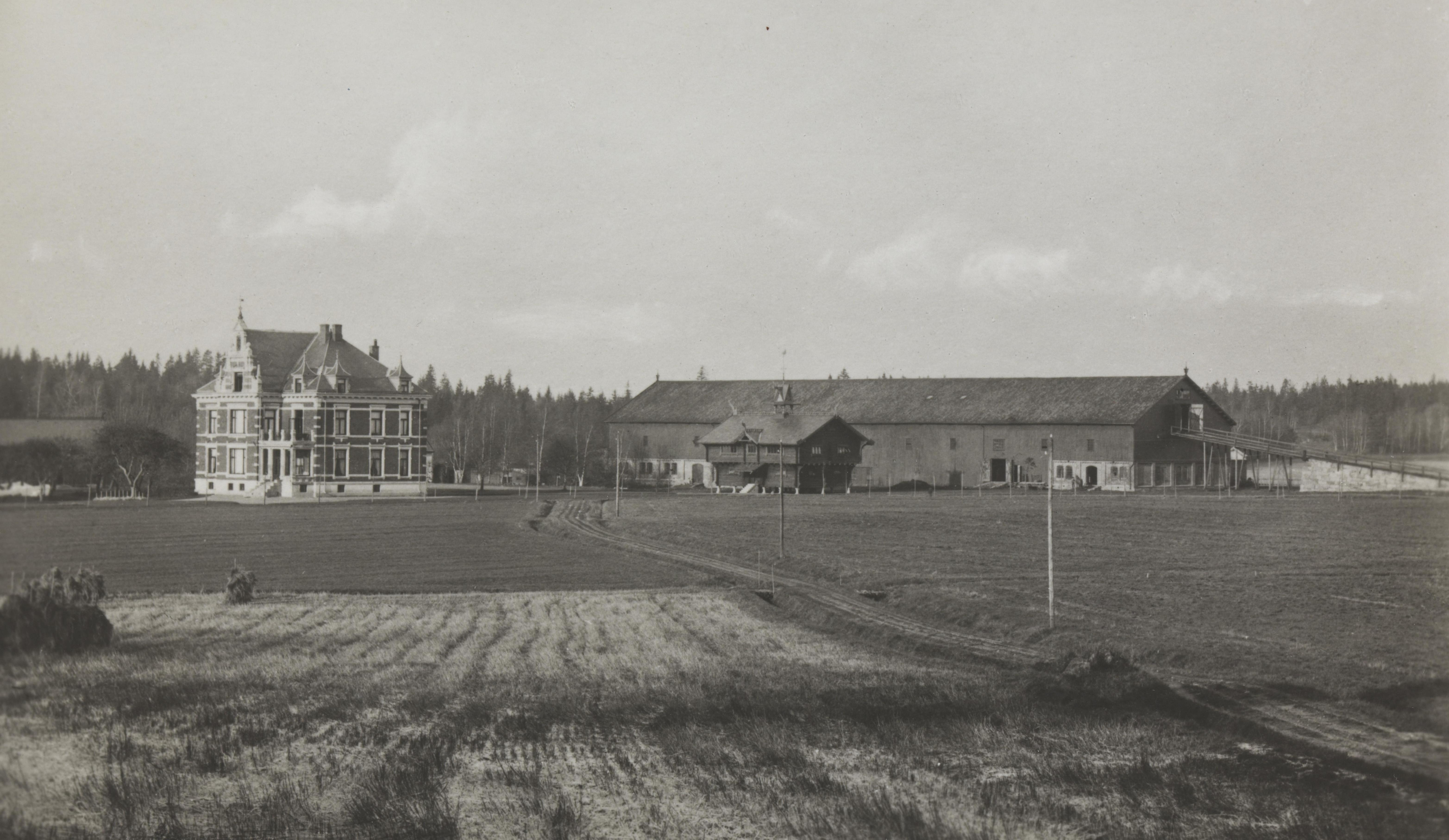 Bildet er hentet fra Nasjonalbibliotekets bildesamling Evje, Rygge, Østfold